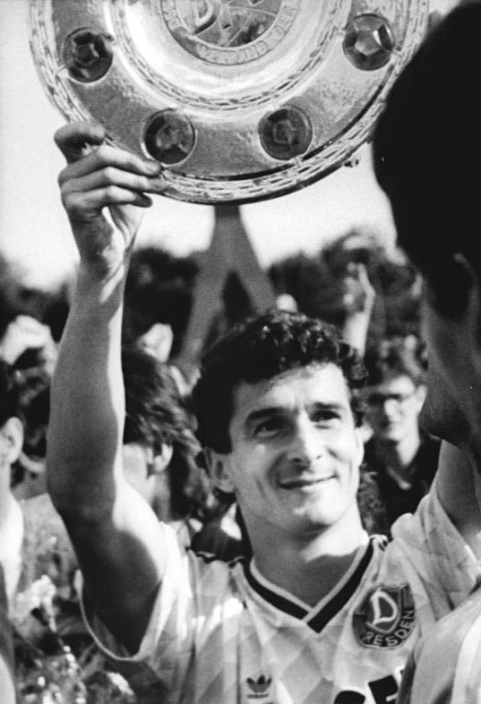 ADN-Häßler-26.5.90-Dresden-Dresden ist DDR-Fußballmeister-Der Pokal des DDR-Fußballmeisters ging auch in diesem Jahr wieder nach Dresden. Dynamo-Kapitän Hans-Uwe Pilz und seine Mannen bezwangen im Finalspiel den 1. FC Lok Leipzig mit 3:1 und verwiesen Karl-Marx-Stadt (Chemnitz) und Magdeburg, die noch punktgleich in den letzten Spieltag gingen, auf die Plätze zwei und drei.